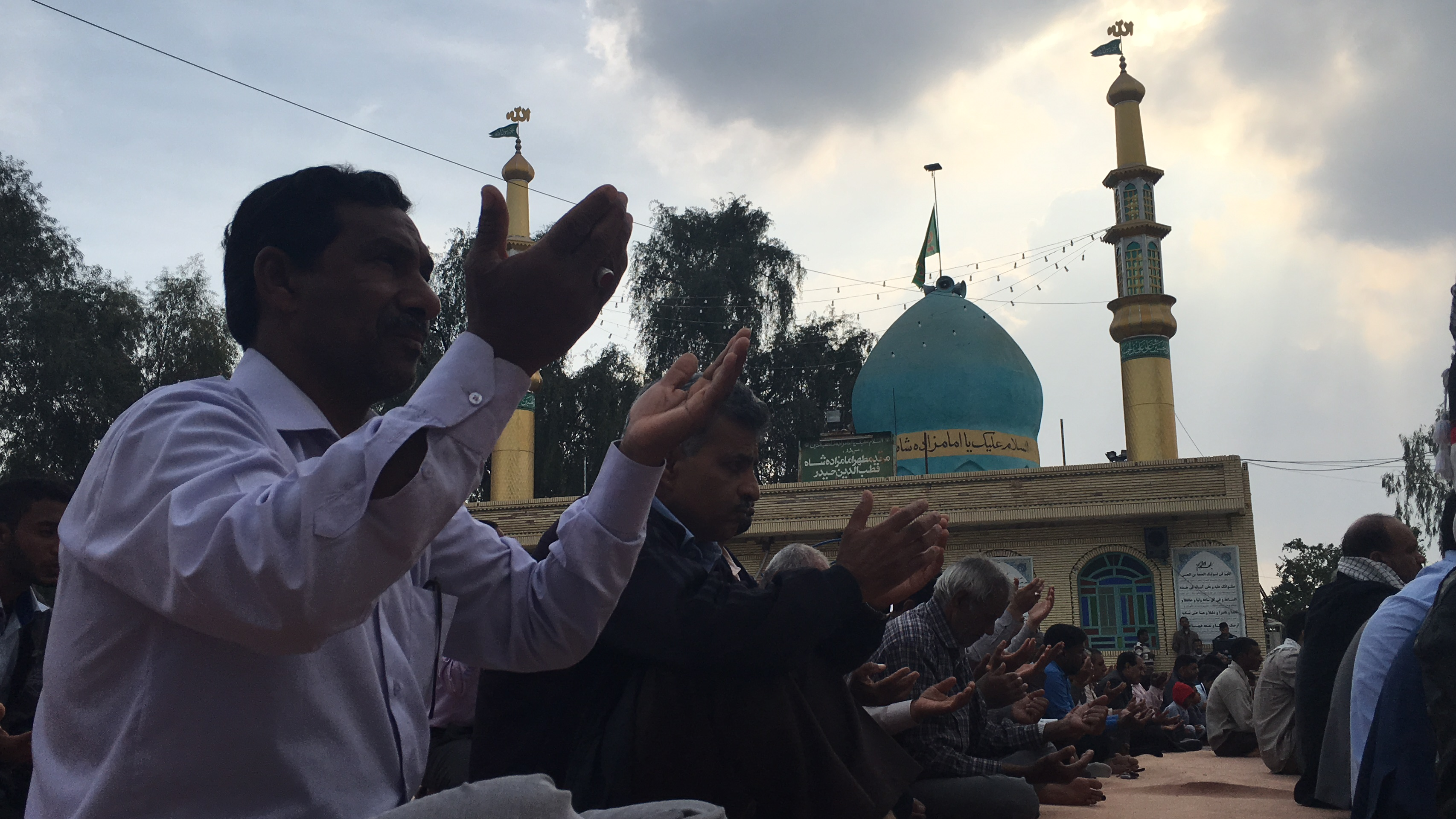 آستان مقدس امامزاده شاه قطب الدین حیدر(ع) رودان